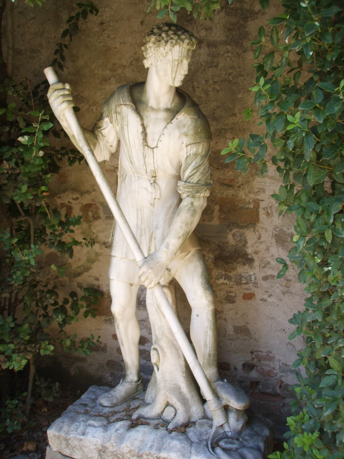 Boboli, Valerio Cioli e Giovanni Simone Cioli, uomo che vanga